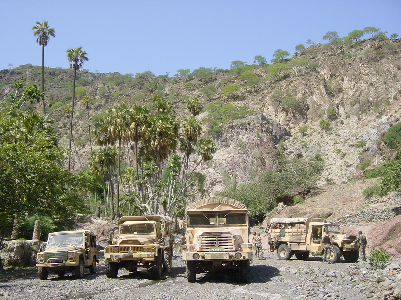 Section transmissions de la 13e DBLE en bivouac à Bankoualé(Djibouti)